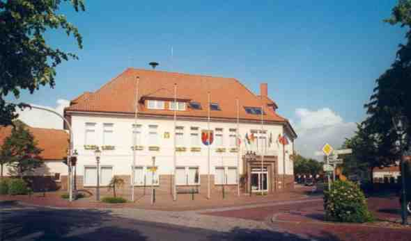 Rathaus zu Apen, fotografiert 2006 von RoswithaC